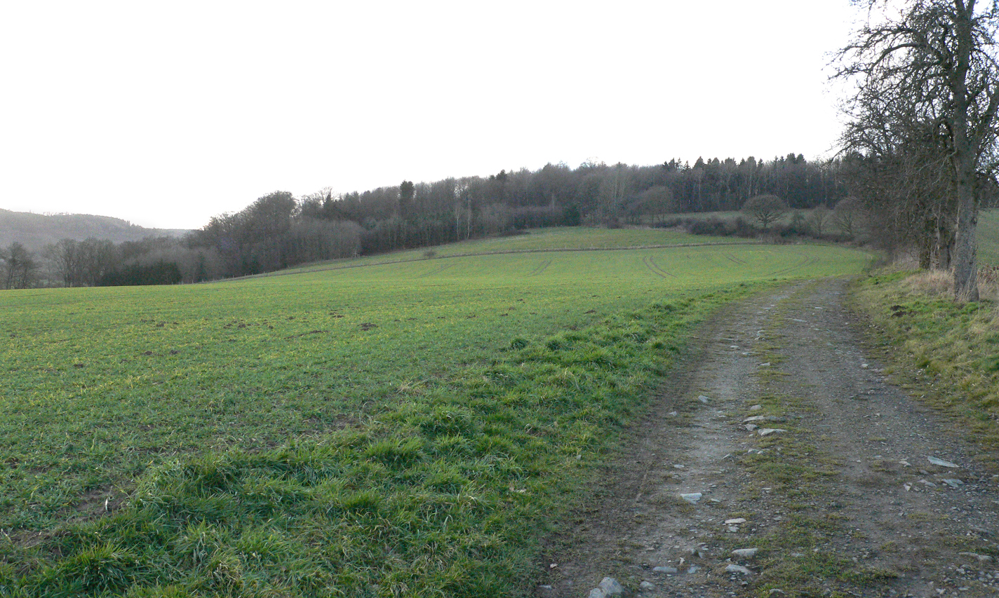 Römerlager Hedemünden, Bereich Lager IV